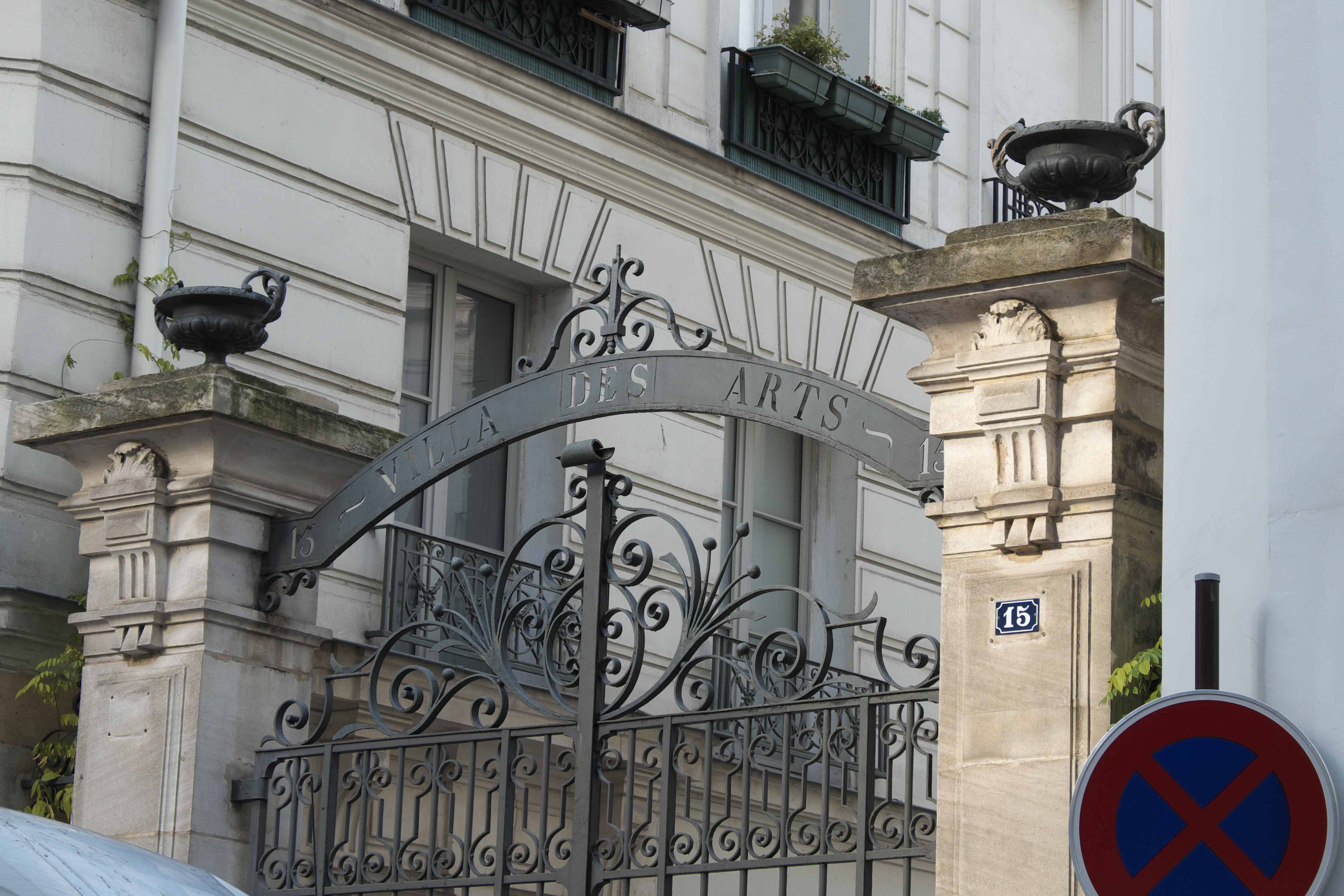 Villa des Arts im 18. Arrondissement in Paris (Île-de-France/Frankreich), Eingang